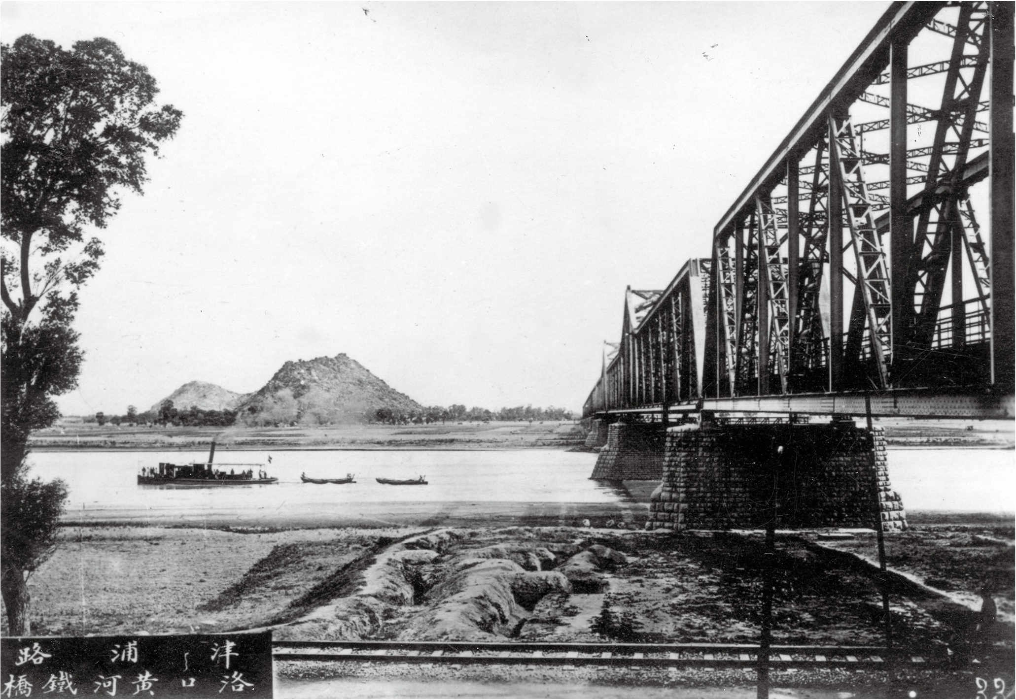 1912年由济南北远眺黄河。远处是鹊山，鹊山位于黄河平原上，突兀矗立，怪石嶙峋，因传先秦名医扁鹊葬于此而得名，是“齐烟九点”中的名山之一。照片中的蒸汽拖轮正由东向西逆流而上，右侧为当年刚建成的津浦铁路泺口铁桥。